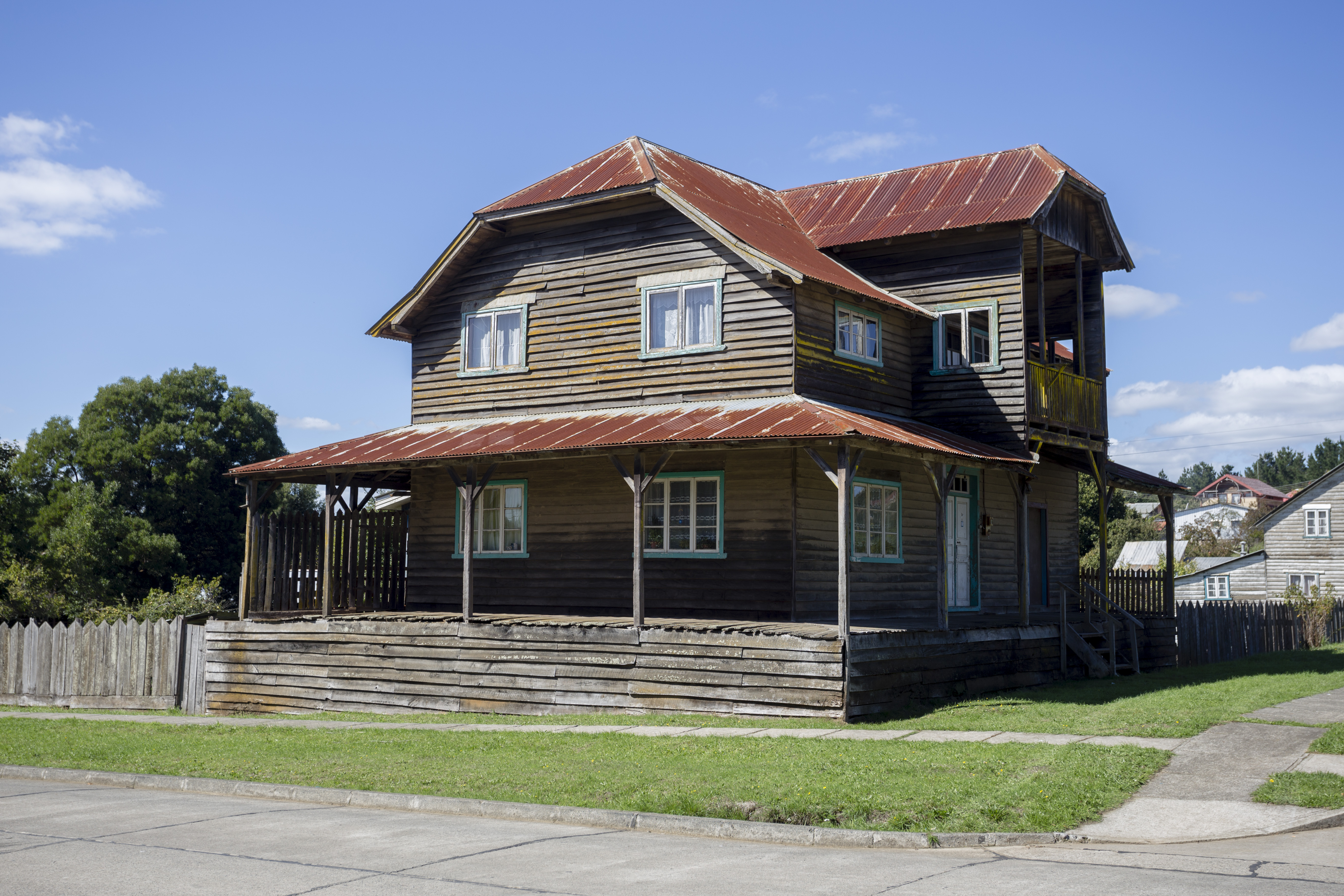 Construcción antigua en Riachuelo, comuna de Río Negro, Chile.